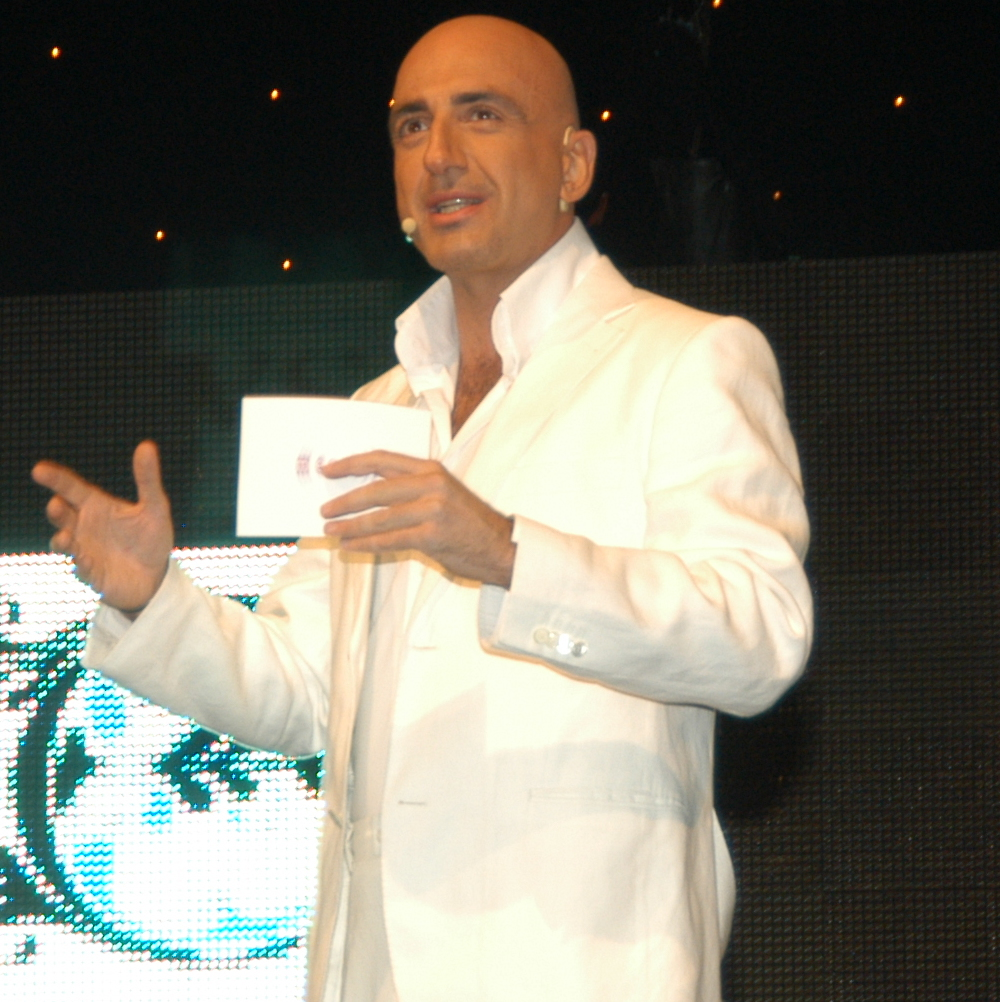 2004 Megahit-Uluslararası Akdeniz Şarkı Yarışması'ndan bir görünüm.